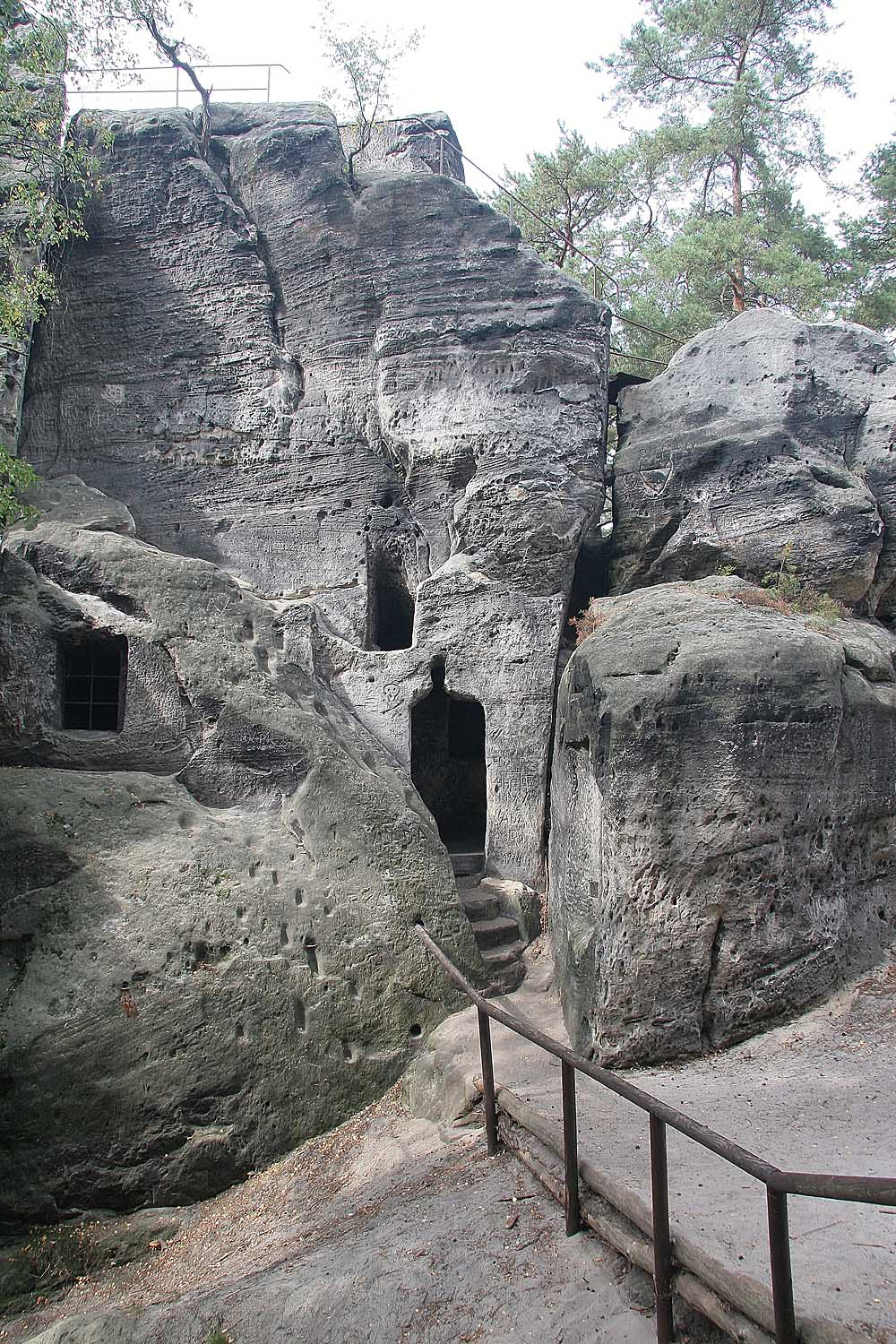 Samuelova jeskyně u Sloupu v Čechách Autor: Zp